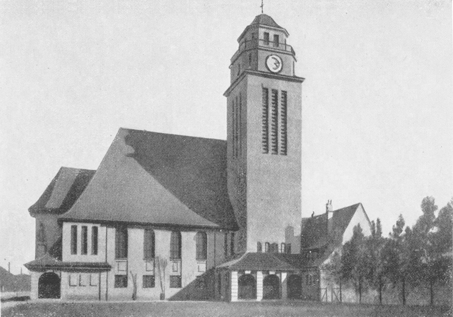 evangelische Königin-Luise-Gedächtniskirche in Breslau, Ofener Straße; erbaut 1913-1915 nach siegreichem Wettbewerbsentwurf des Architekten Ewald Wachenfeld; 1945 zerstört